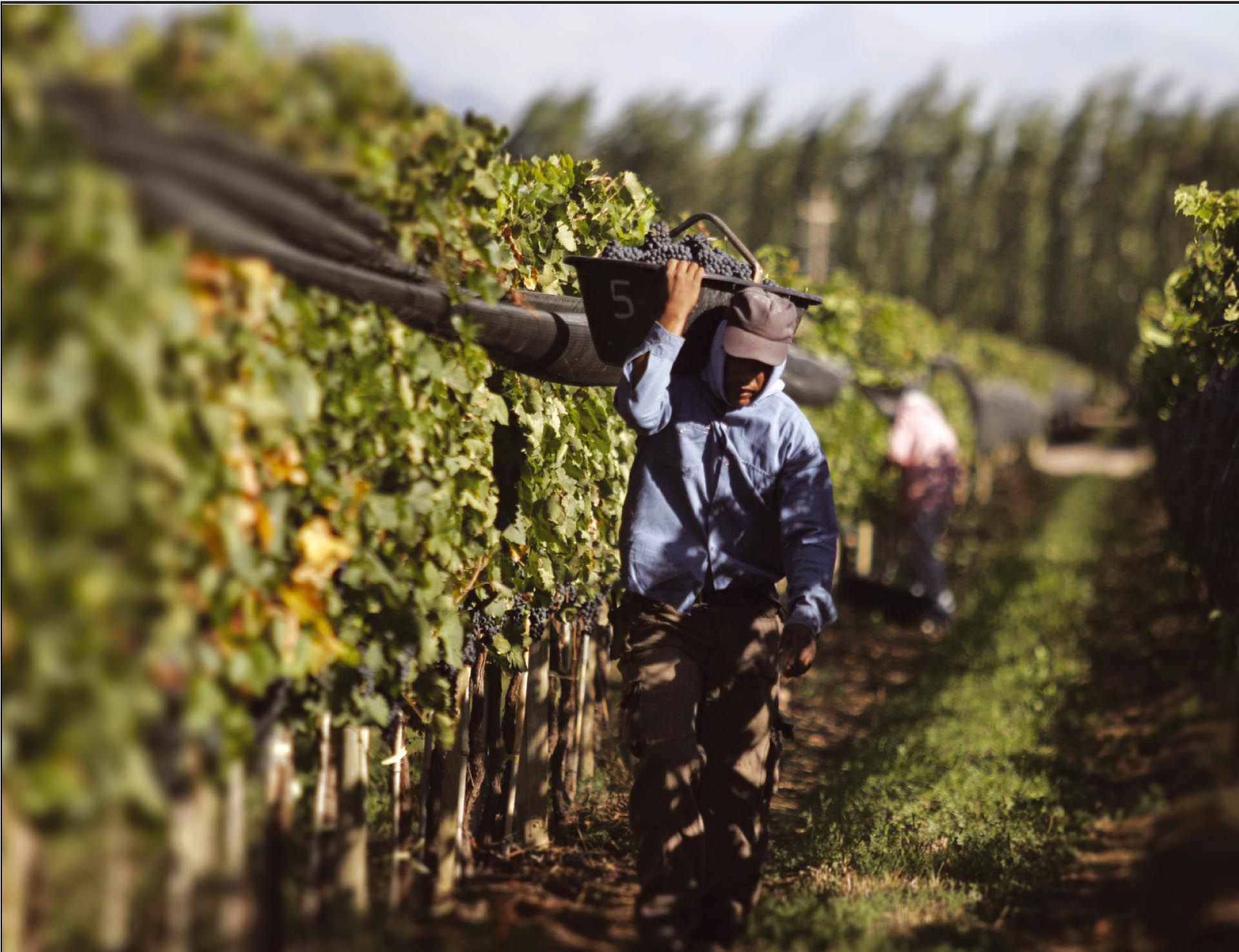 Plantacion de Bodega Chakana en Agrelo, Lujan de Cuyo, Mendoza.